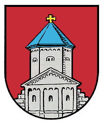 Wappen des Ortes Seebach (Bad Dürkheim) in Bad Dürkheim